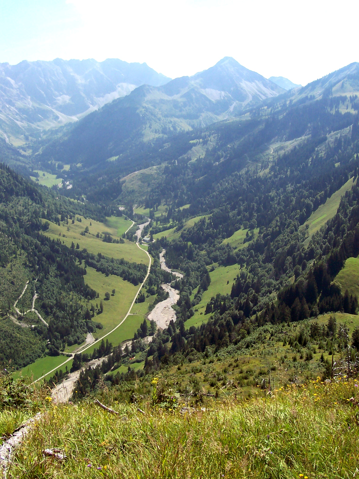 Retterschwangtal vom Norden (nähe Imberger Horn). Bildmitte (klein) die Mitterhausalpe.